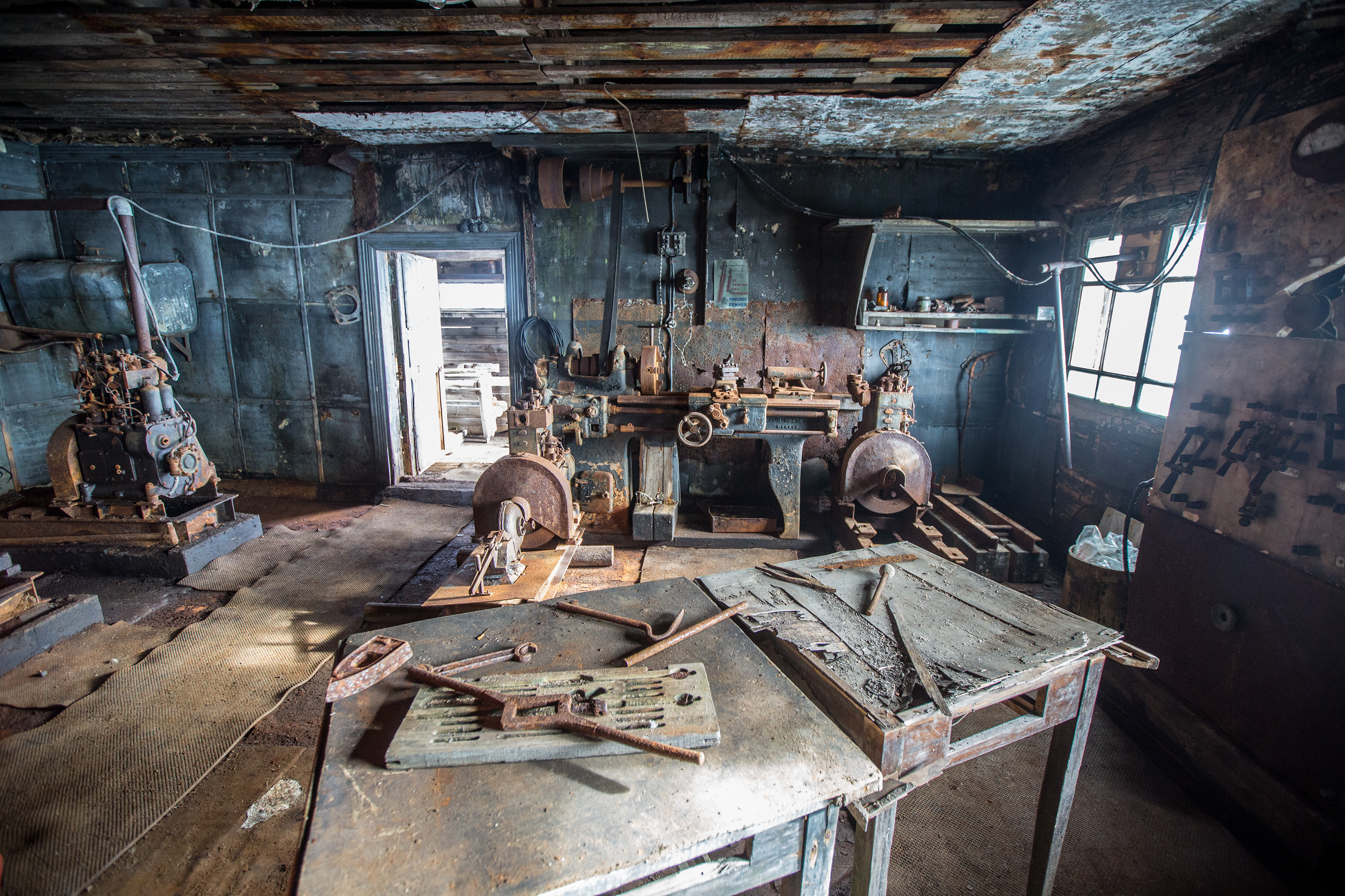 Внутри электростанции на территории полярной станции "Бухта Тихая". Остров Гукера. Комплексный заказник Земля Франца-Иосифа: Архангельск, Приморский район, Архангельская область. Снимок сделан в рамках экспедиции "По следам двух капитанов", организованный Ассоциацией "Морское наследие" проекта "Архипелаги Арктики: Открытый океан". This image is related to the protected area of Russia number 2930163